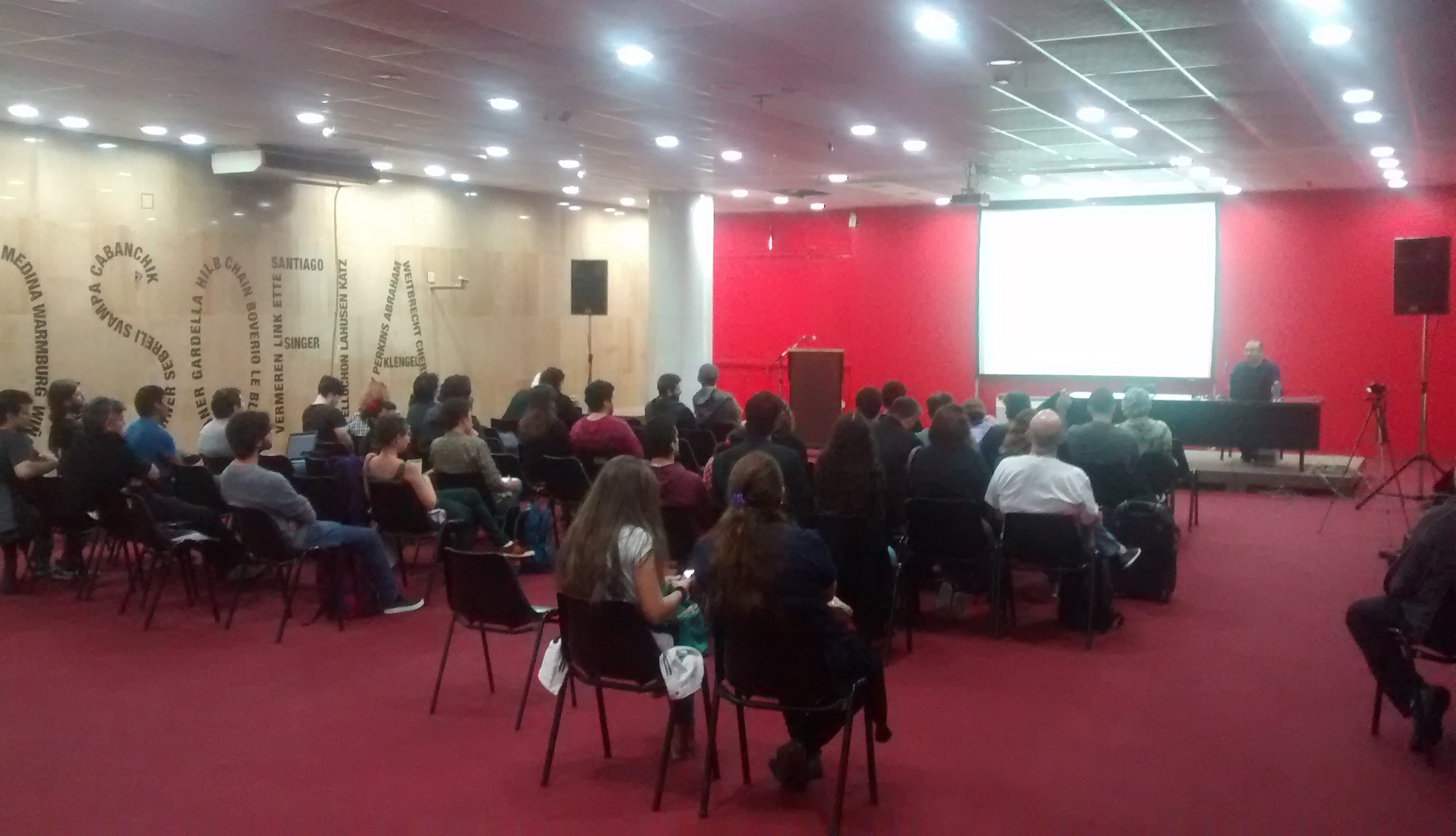 Charla en marco de la FLISoL 2016 en la Ciudad Autónoma de Buenos Aires, Argentina en el Centro Cultural General San Martín, Sala C.